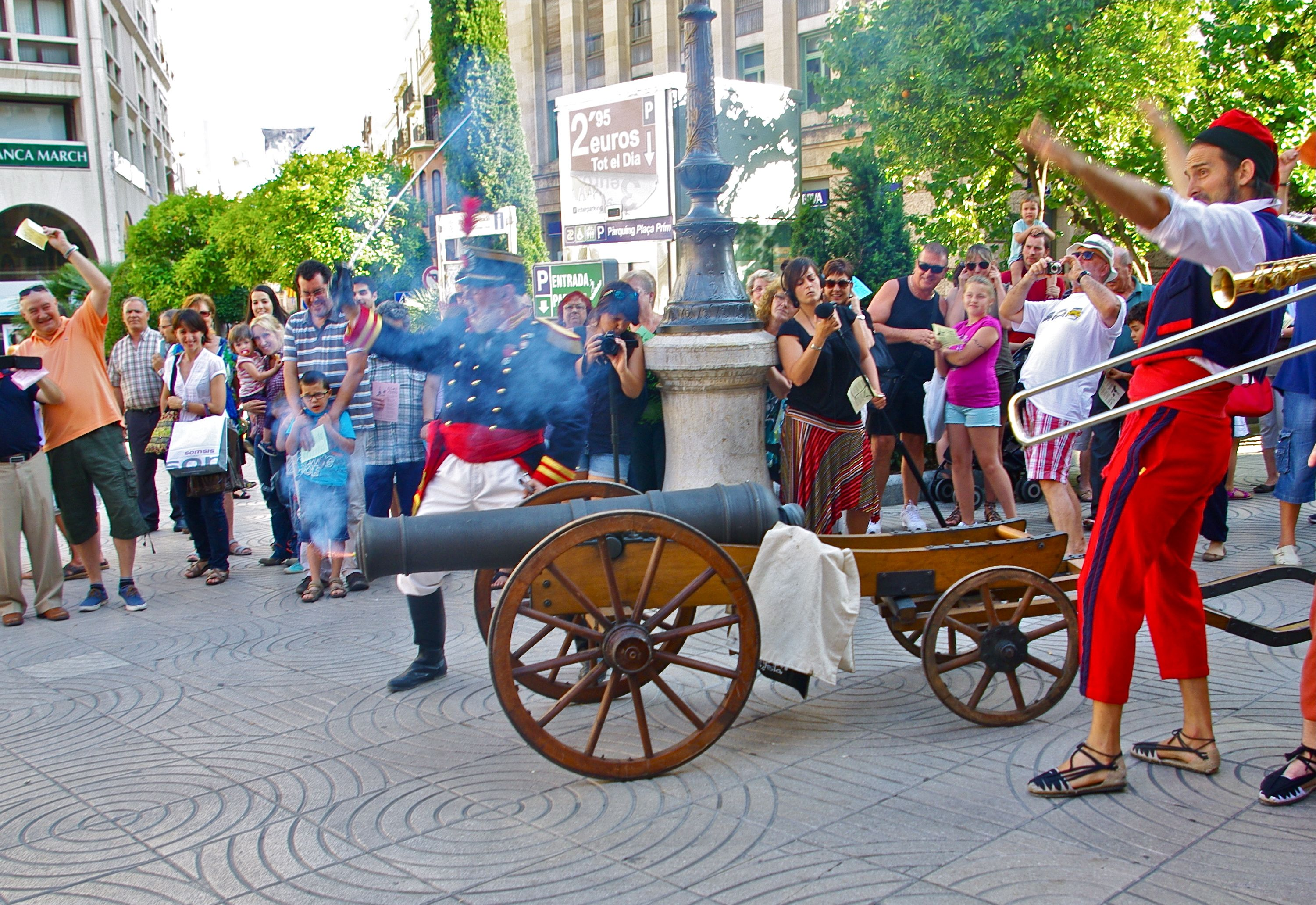 El Canó de Reus anunciant la Festa Major de 2014